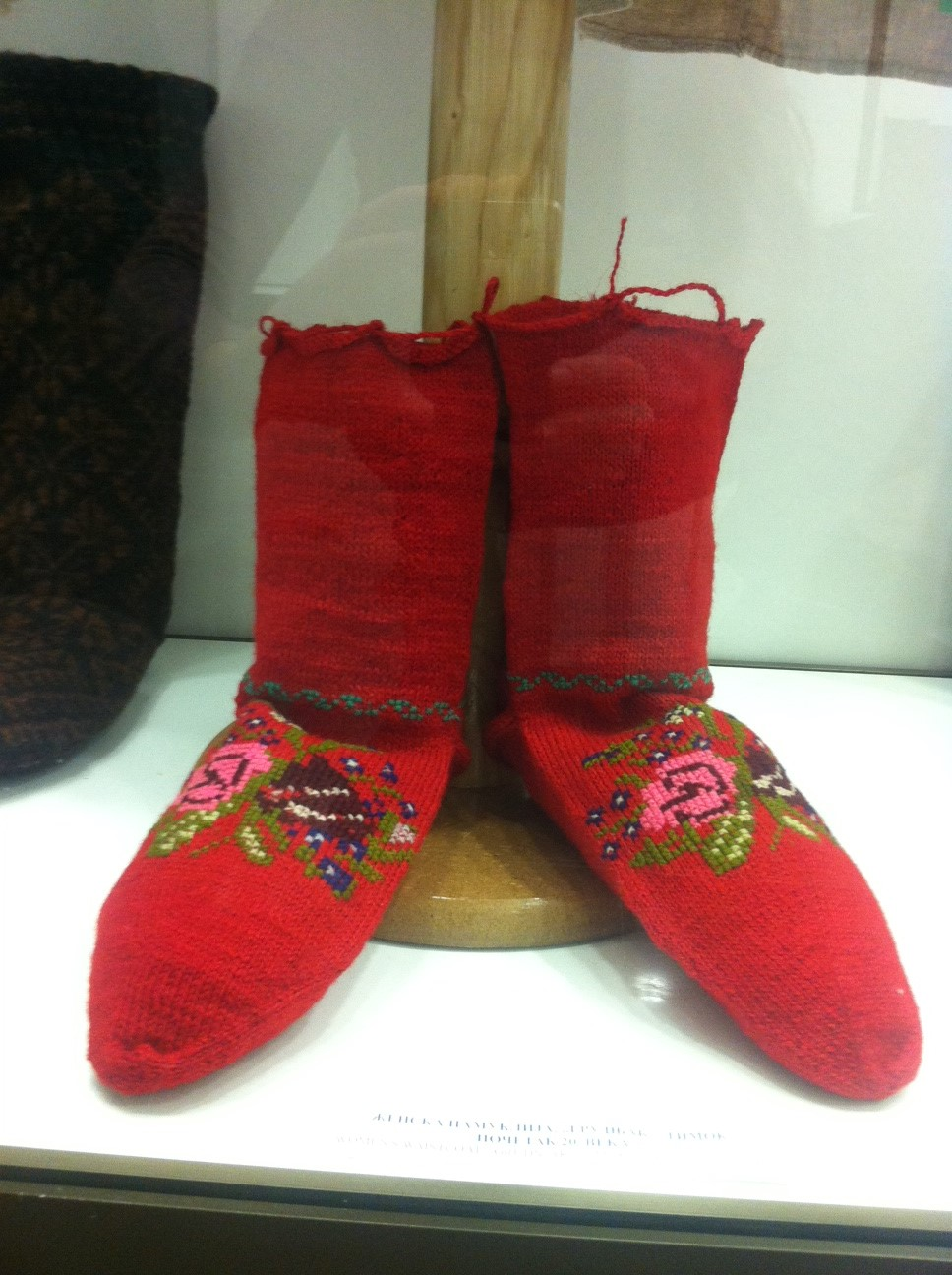 Srpski (latinica): Dvopređne čarape